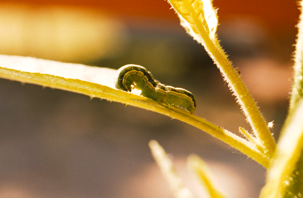 Spodoptera exigua larva feeding on Nicotiana attenuata.